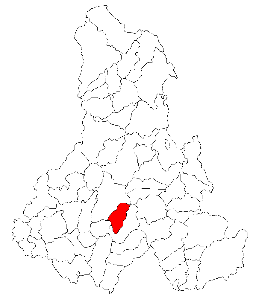 Categorie:Hărţi ale judeţului Harghita Contents 1 Licensing 2 Sursă 3 Licensing 4 Original upload log Licensing Sursă ro::Imagine:Harta_jud_Harghita.png